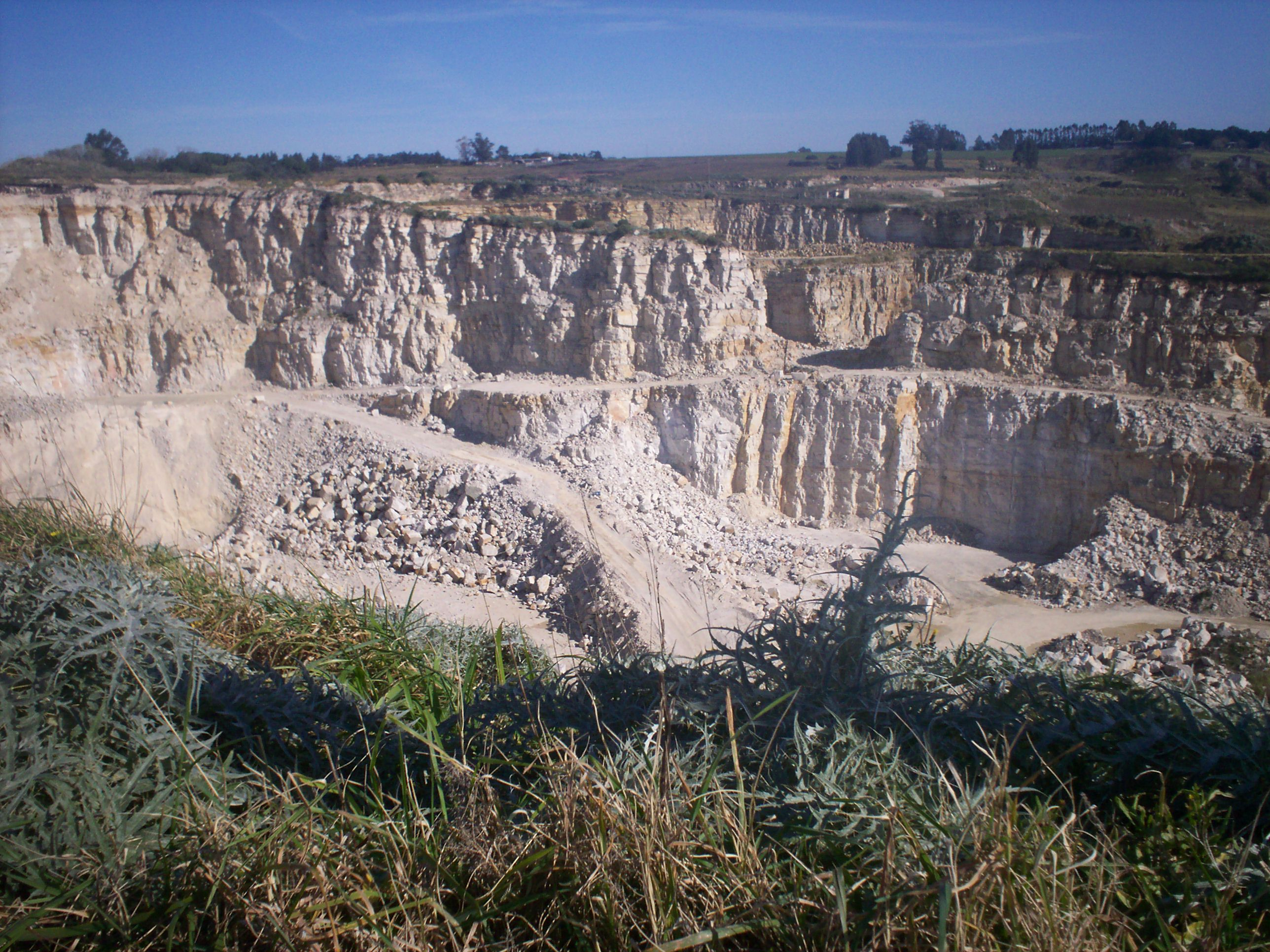 Vista de la cantera de Batán